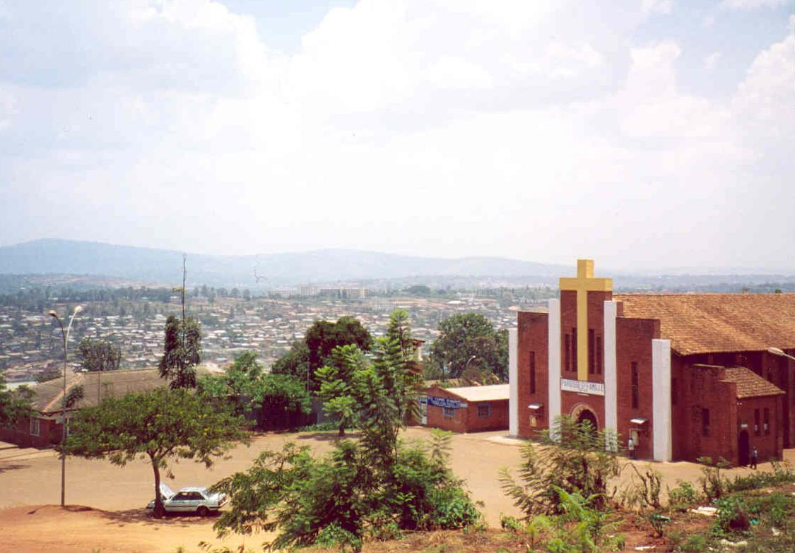 L'église de la Sainte-Famille à Kigali, Rwanda. Image scannée de la photo argentique originale datant d'octobre 2002.